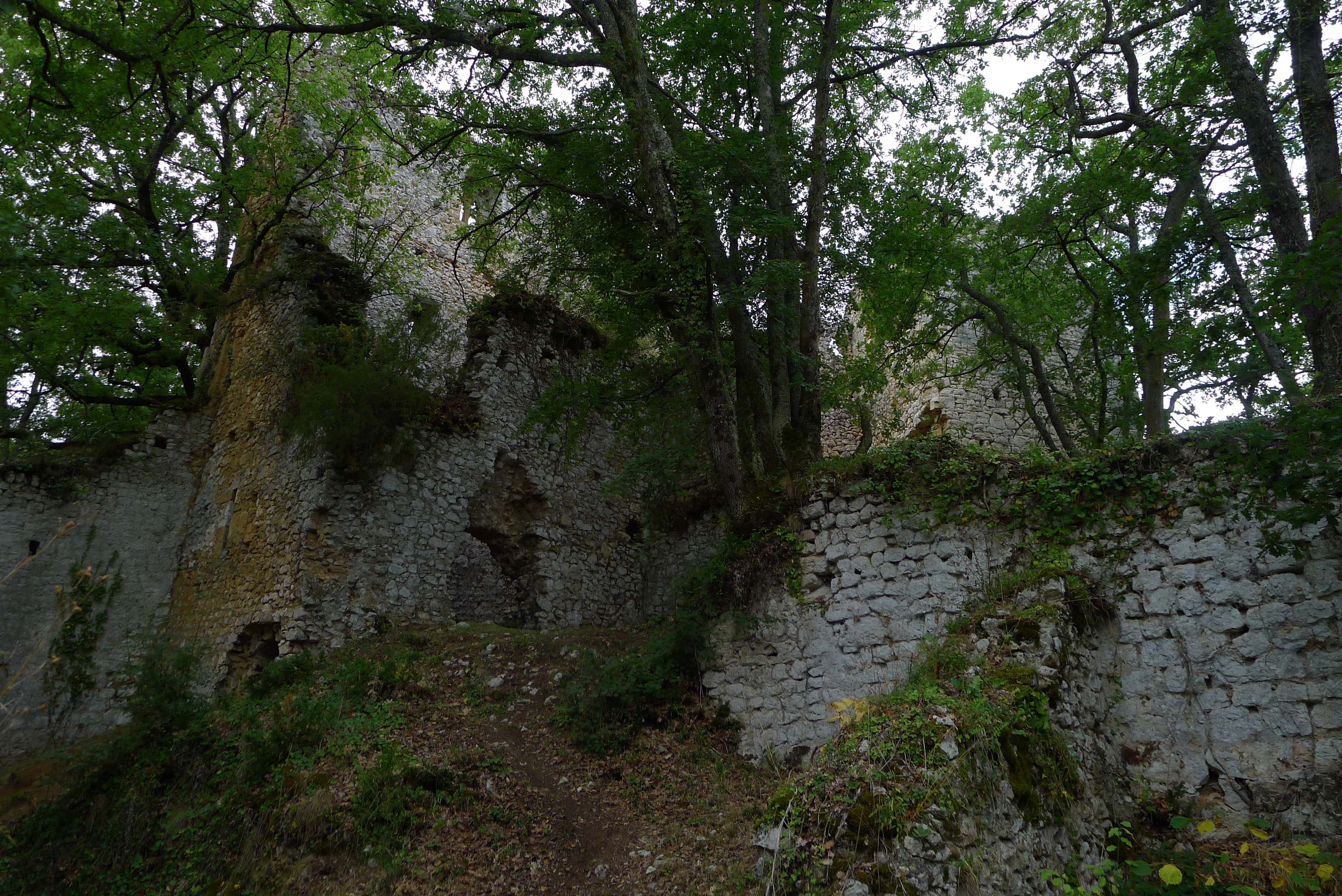 Vue d'ensemble des ruines du château médiéval de Lespugue